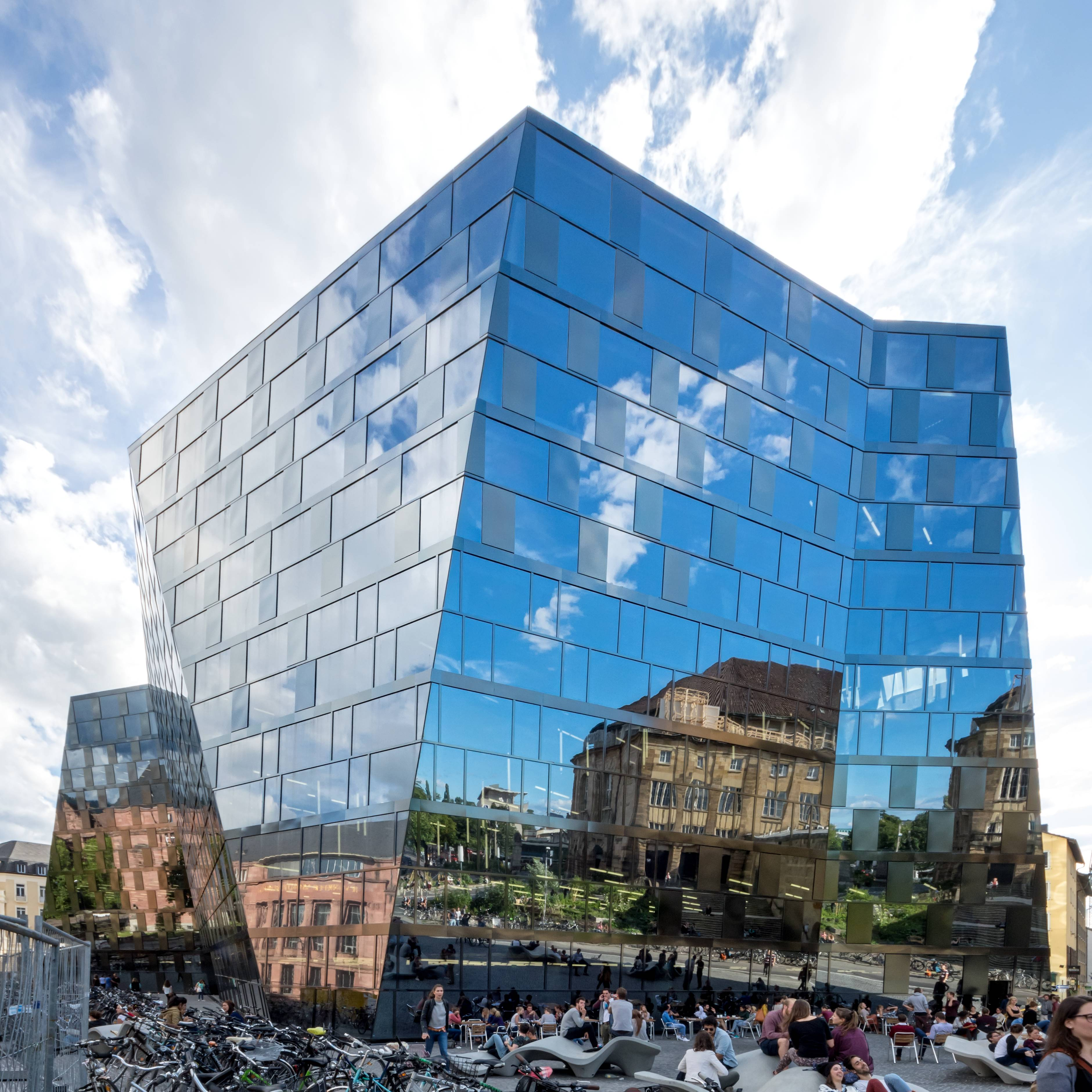 Die neue Ubi Bibliothek nach der Eröffnung